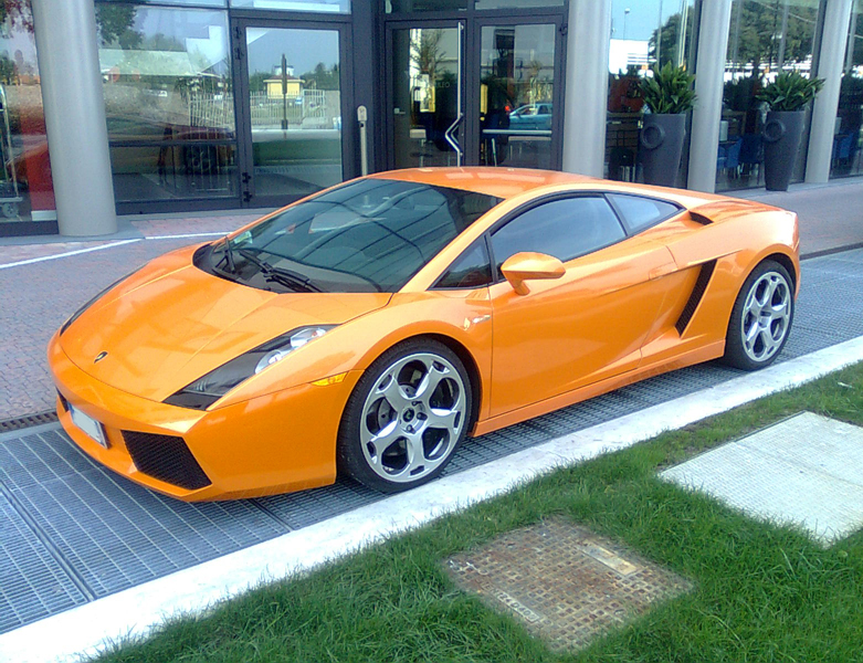 Una Lamborghini Gallardo